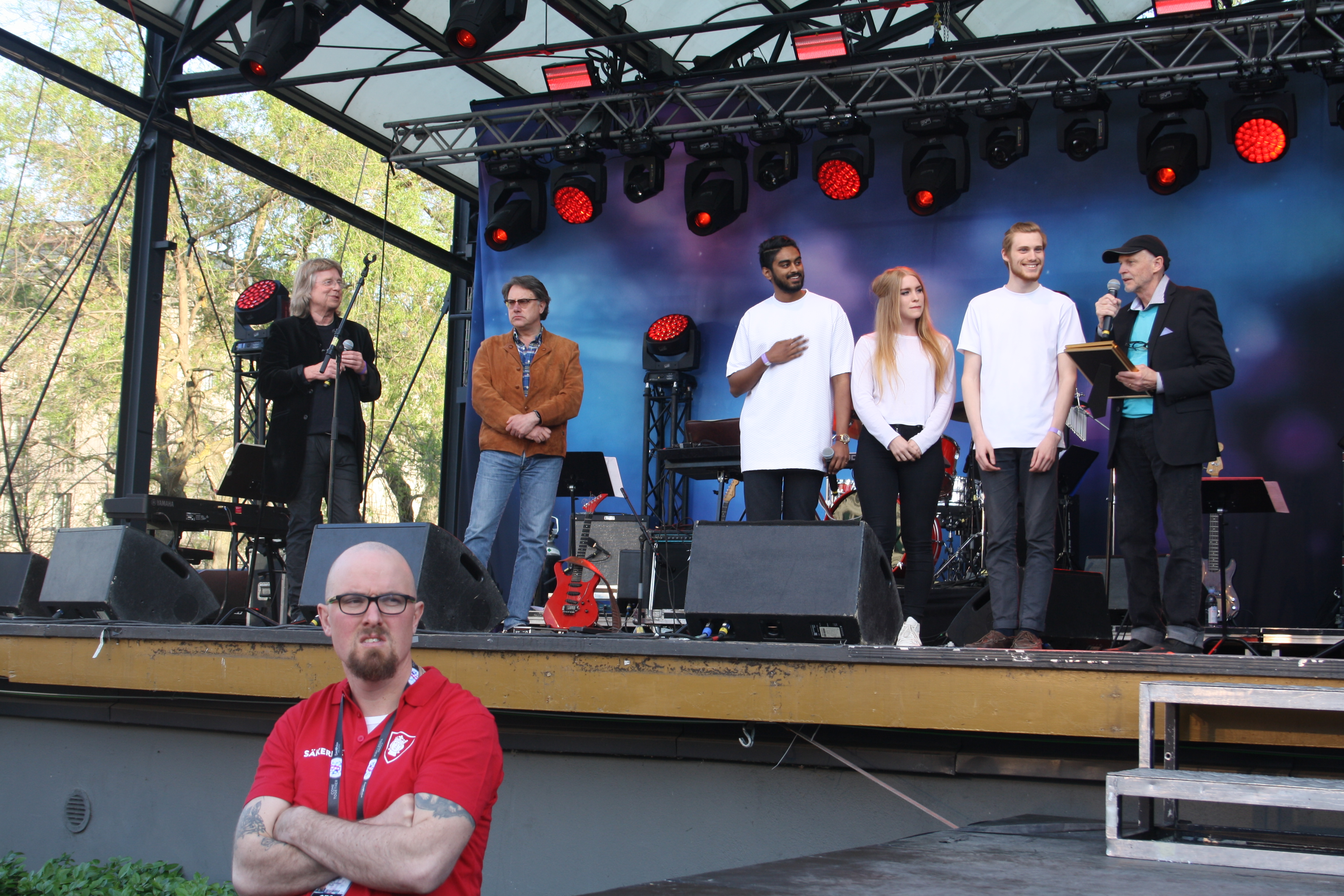 Södra Station får Ted Gärdestadsstipendiet 2016